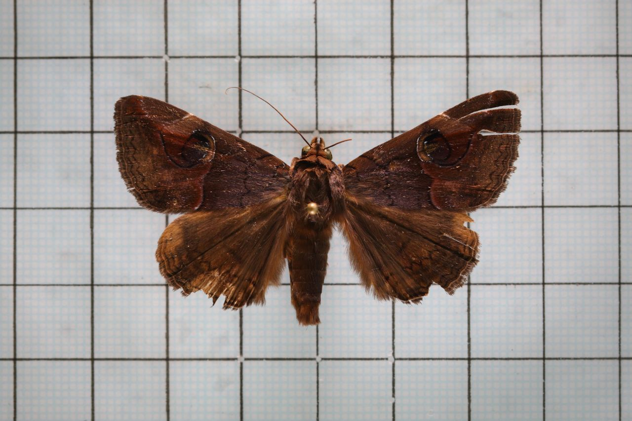 Ommatophora luminosa (Cramer) 瞳夜蛾 鞍1:P.66,Pl.16-25